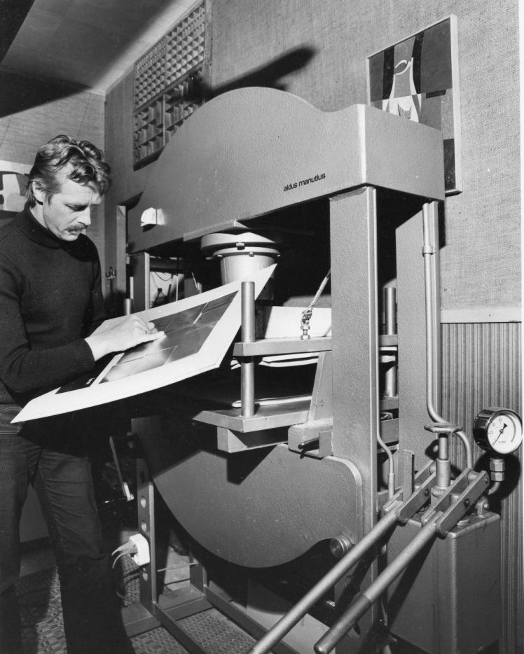 Harry van Kuyk met een drukontwerp voor zijn reliëfdrukpers Aldus Manutius, Nijmegen 1973